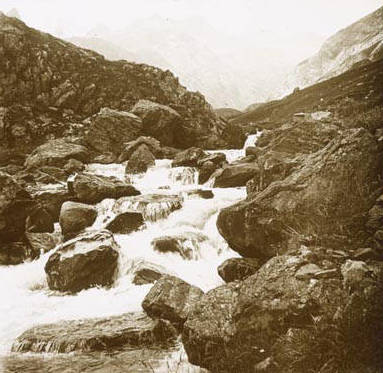 Gave d'Ossau i el Vinhamala al fons. Santiago Perdigó i Díaz Caneja (1921-07)